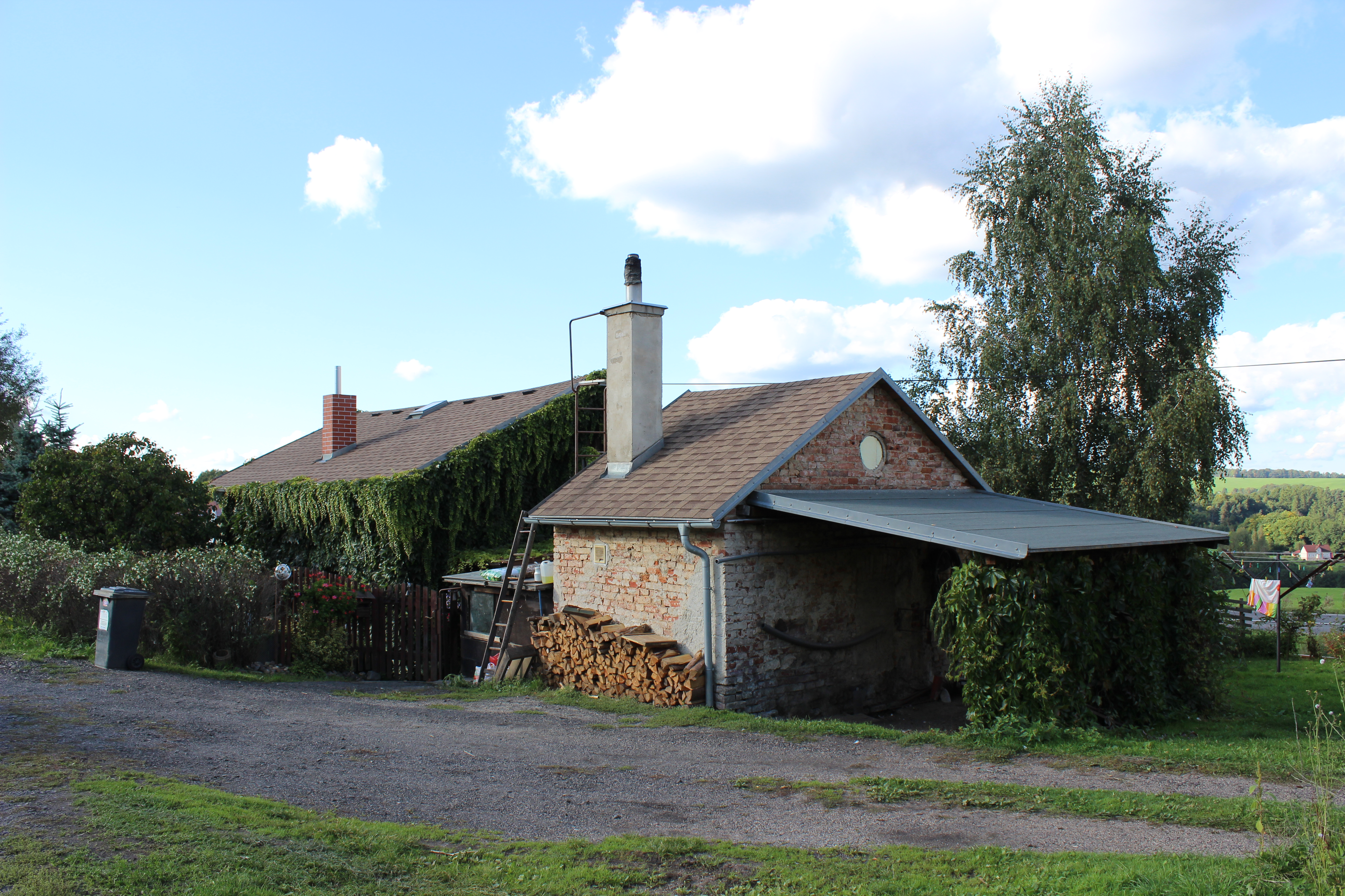 Dům číslo popisné 24 ve Vísce pod Lesy, části České Kamenice.